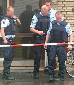 dansk politi i taktisk skudsikker vest